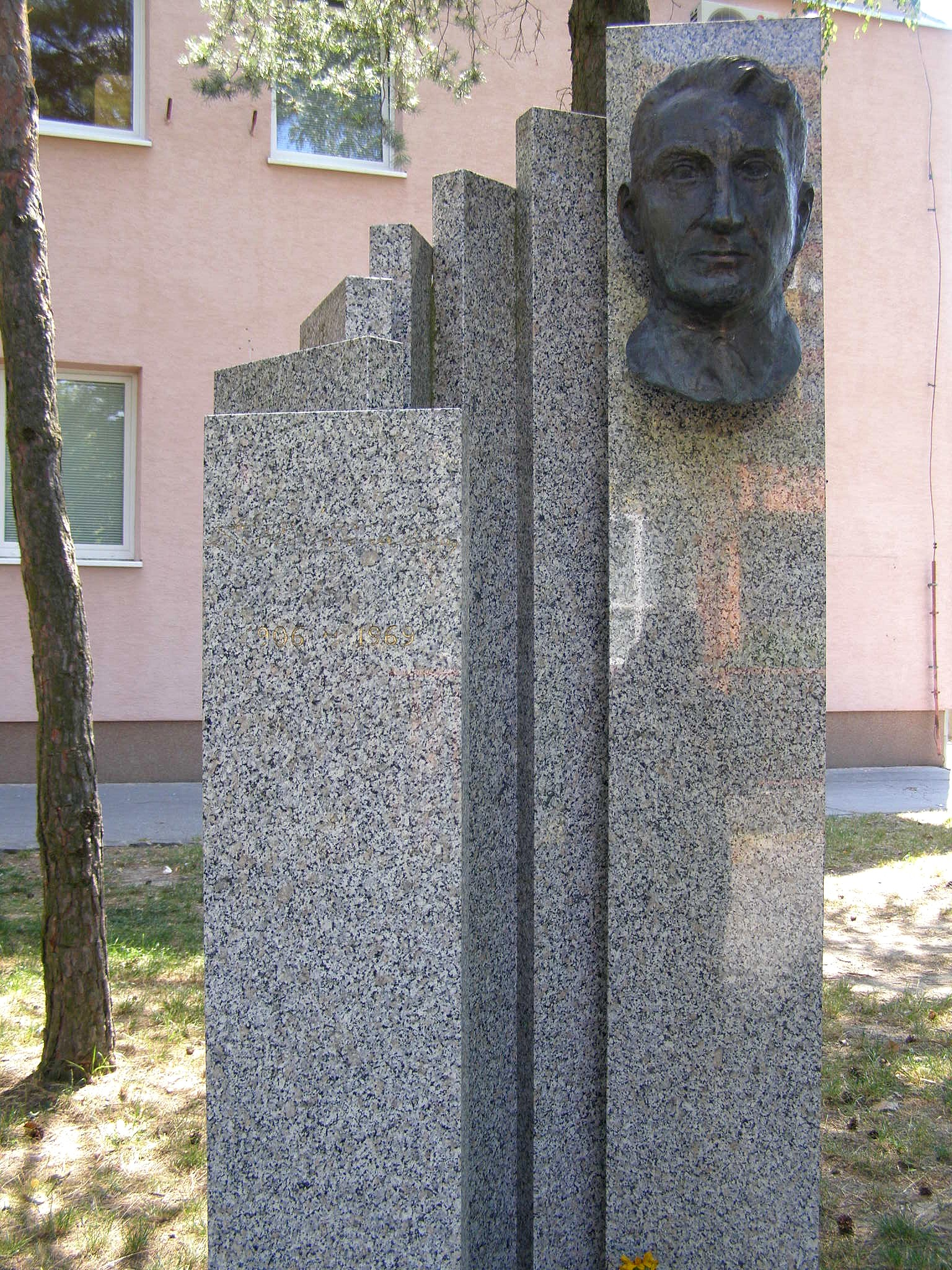 Pamätník venovaný historikovi Alexandrovi Húščavovi (1906 - 1969) v parku na Heyrovského ulici v Lamači. Jeho autorom je akademický sochár Michal Zdravecký